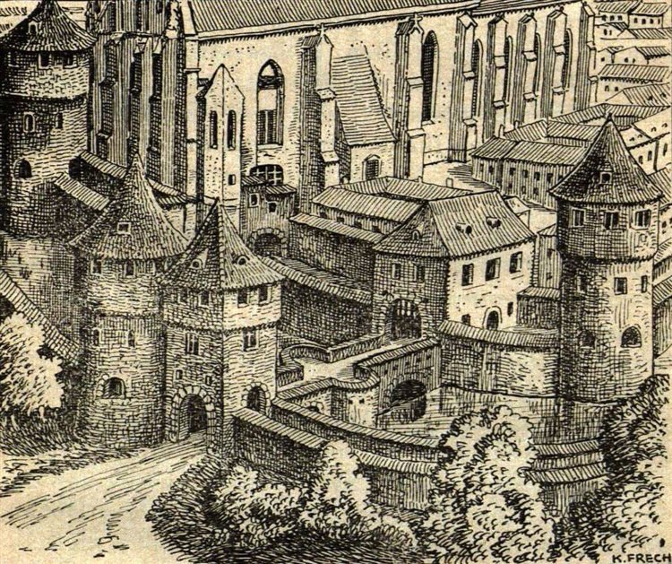 Rekonstruktionszeichnung von Karl Frech (um 1928)